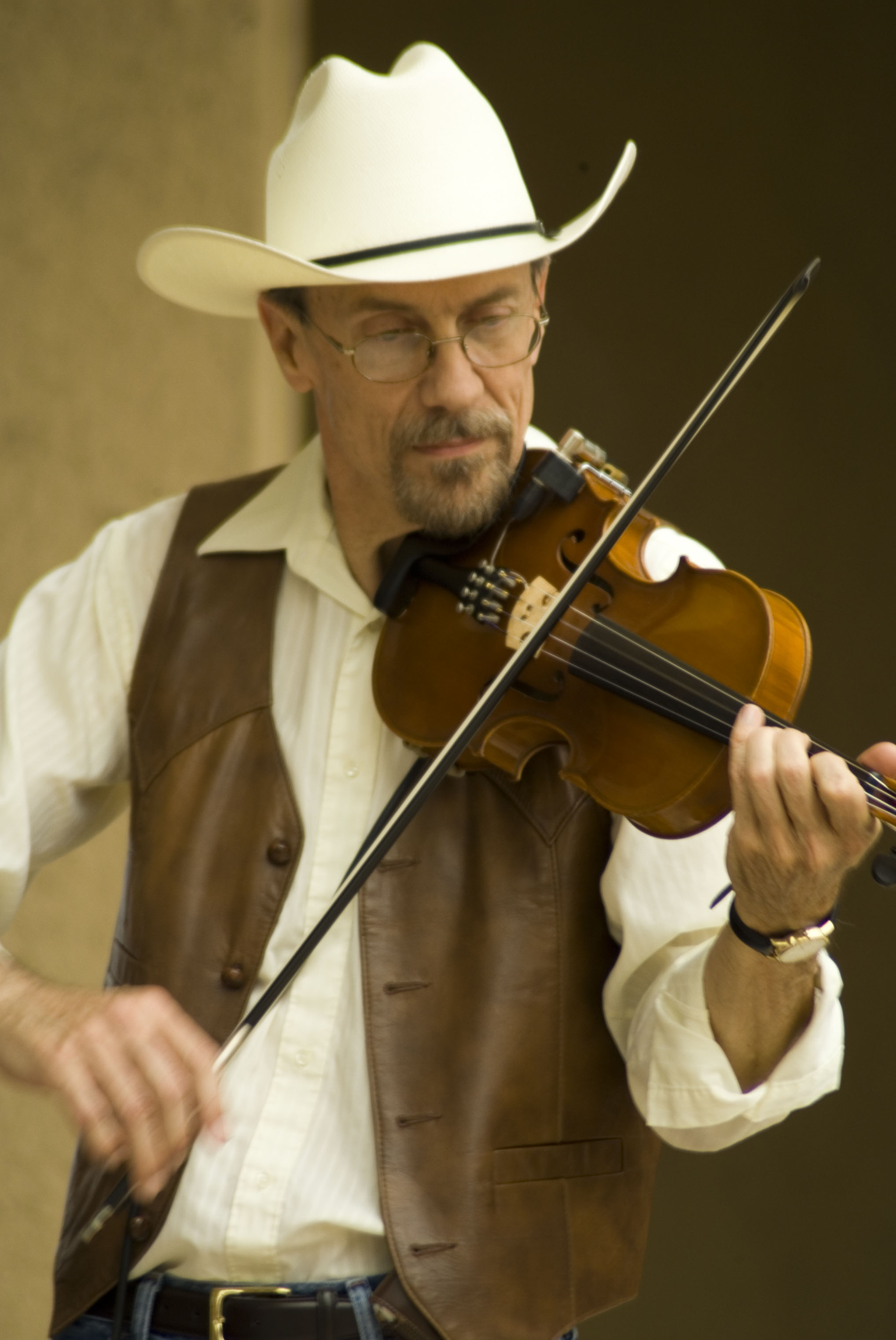 Fiddler in Wichita Riverfest